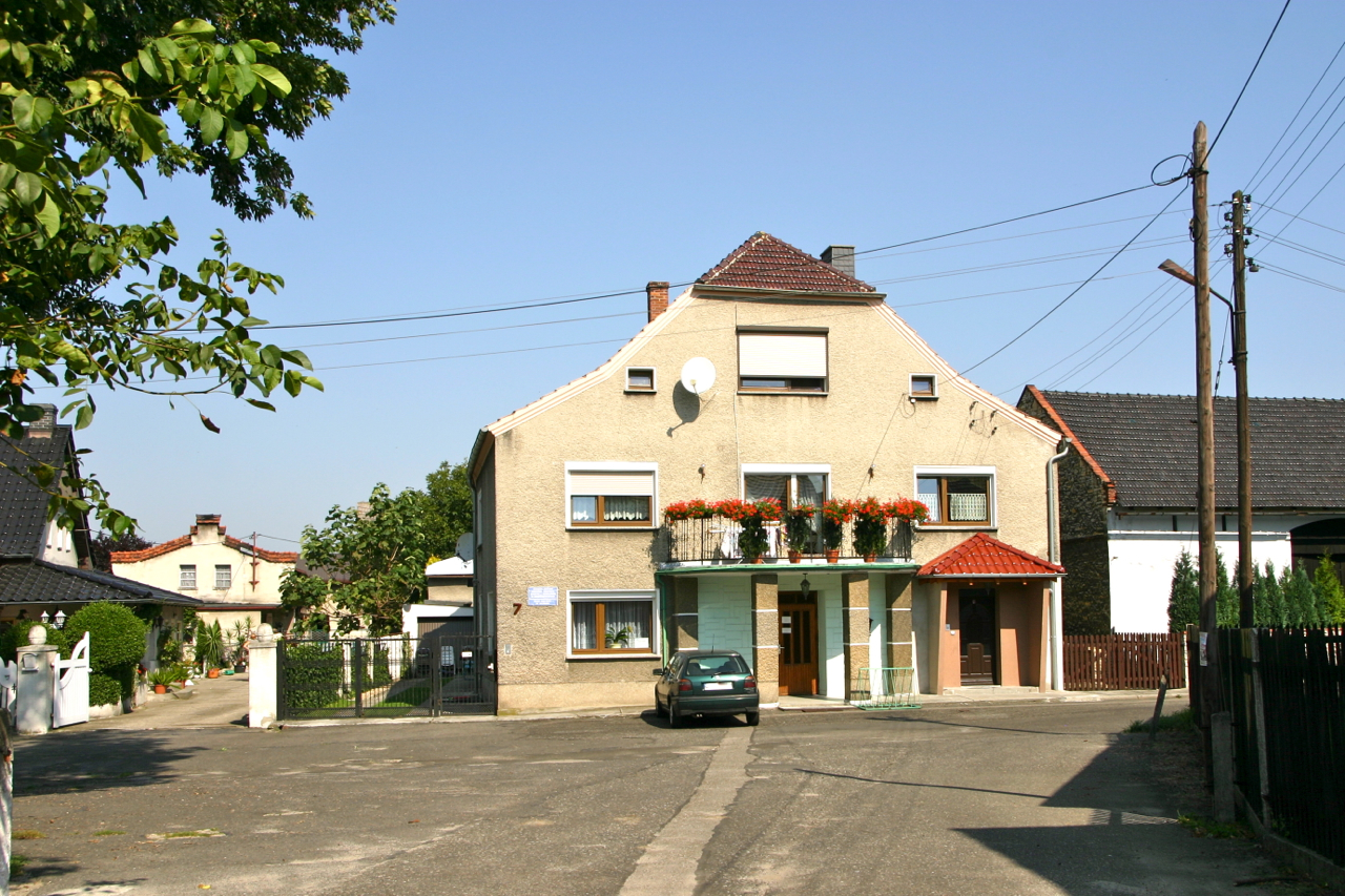 Oleszka (niem. Oleschka) – wieś w Polsce położona w województwie opolskim, w powiecie krapkowickim, w gminie Zdzieszowice.